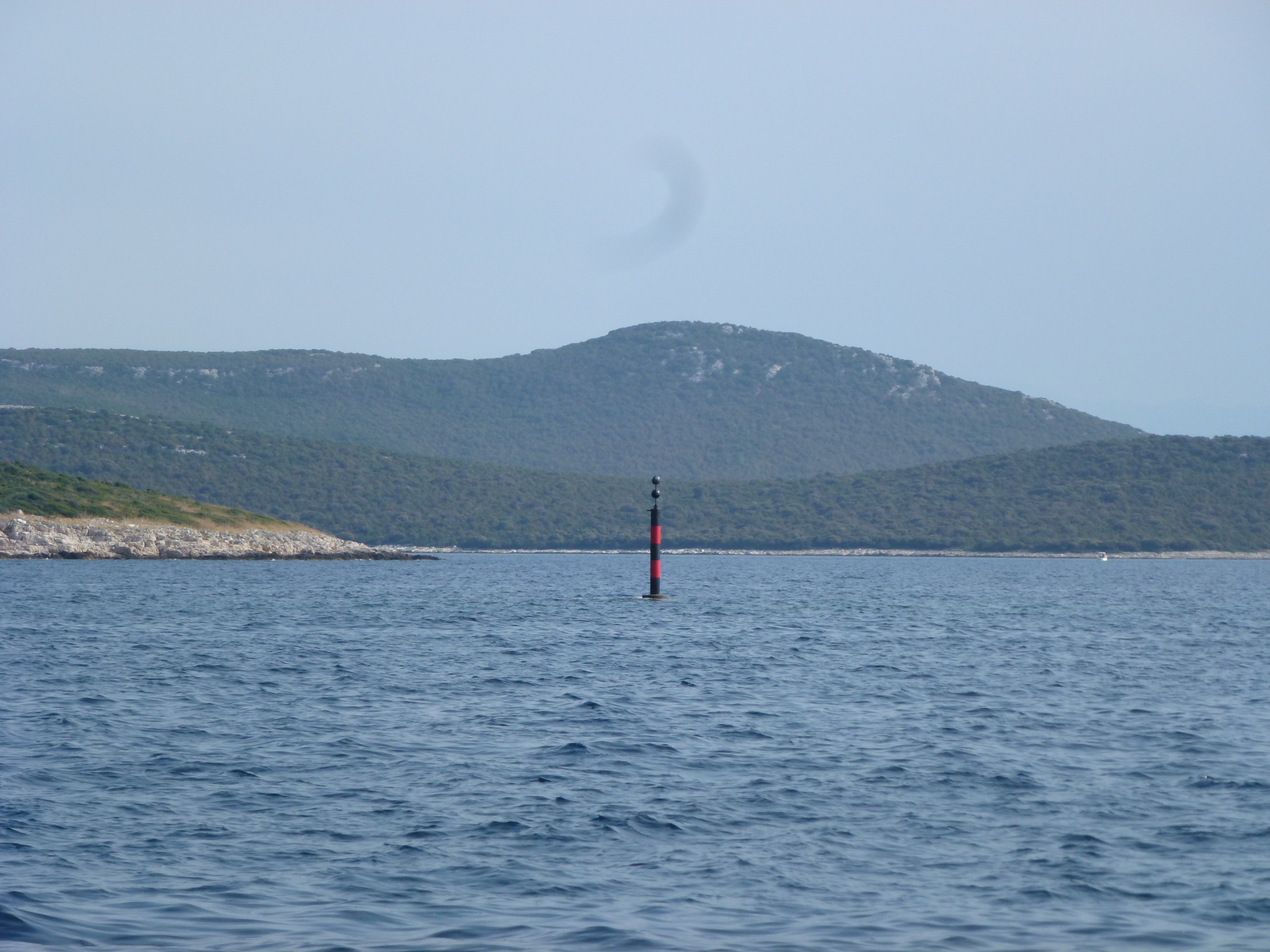 Einzelgefahrzeichen der Untiefe Gr Bacvica nahe der Inseln Tramercica und Tramerka in Kroatien